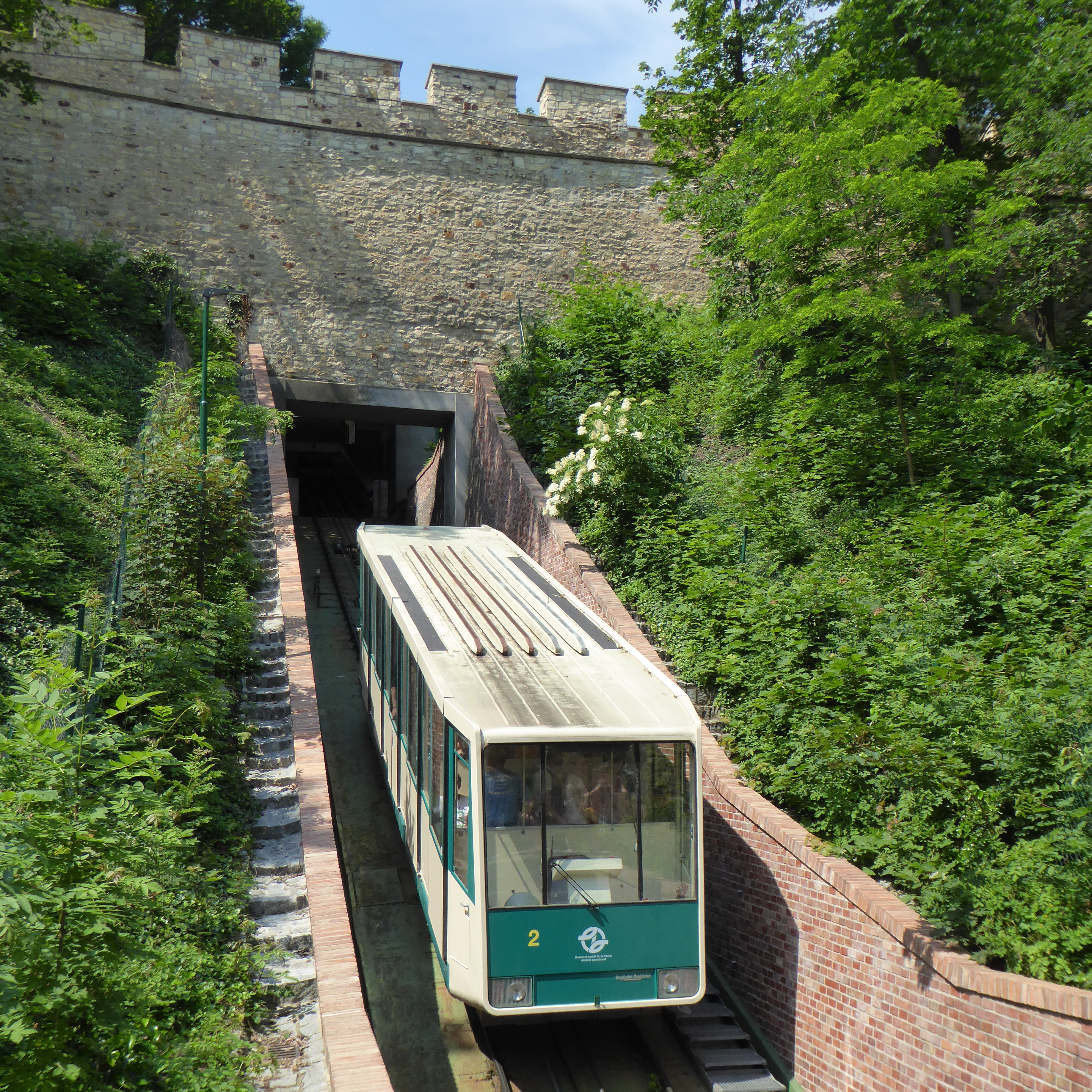 Vůz lanové dráhy na Petřín v Praze u horní stanice.